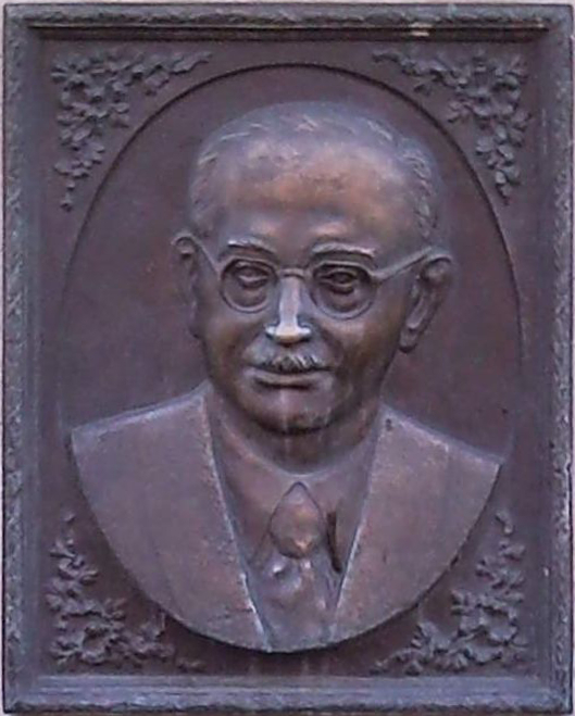 Mező Ferenc portréja a TF udvarán álló emlékoszlopon